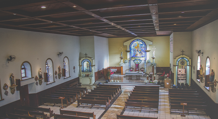 Interior da Matriz da Imaculada Conceição, Mogi Guaçu/SP - Brasil